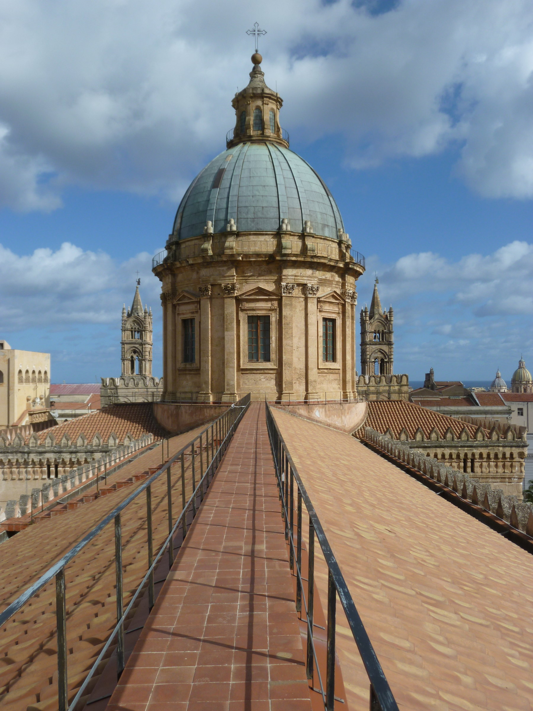 Palermo